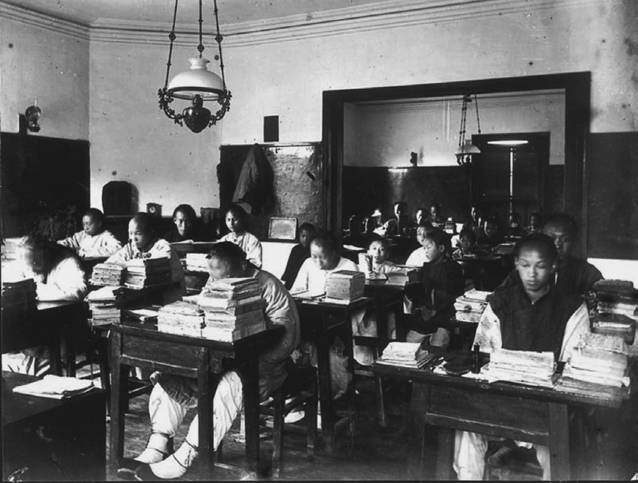 汇文书院中学部学生在钟楼内教室读书。汇文书院存在于1888年-1910年，因此该照片拍摄于1888年-1910年。